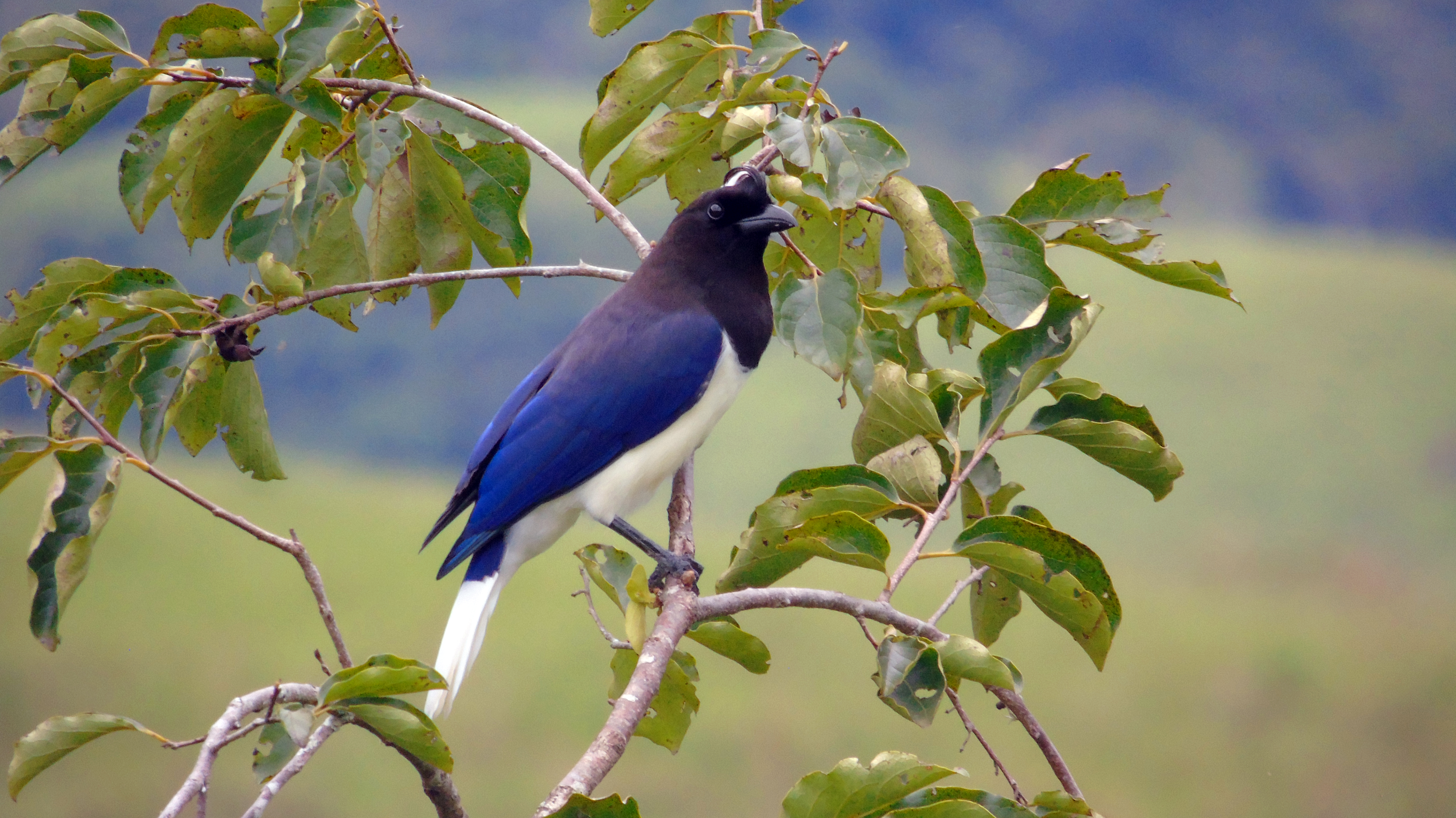 Foto tirada no sítio em Pindamonhangaba